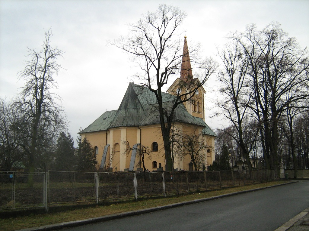 Kostel ve Třebovicích, Ostrava, CZ/Church in Třebovice, Ostrava, CZ rear view